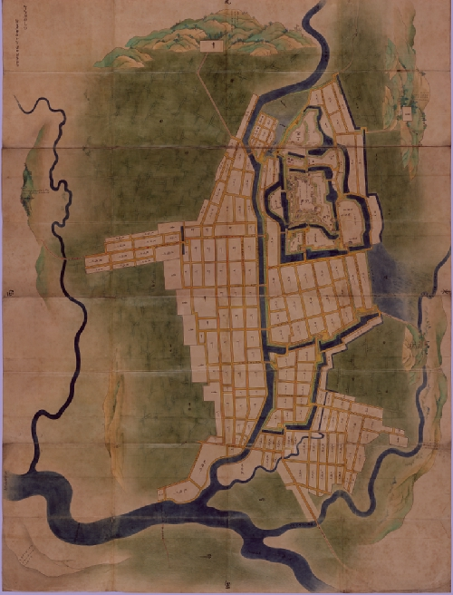 『正保城絵図』（1644年）より「出羽国秋田郡久保田城画図」